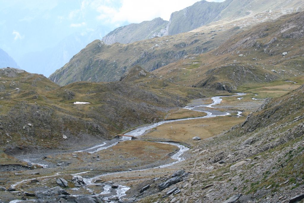 Sorgenti del Brembo (Pizzo del Diavolo), Bergamo, Italy